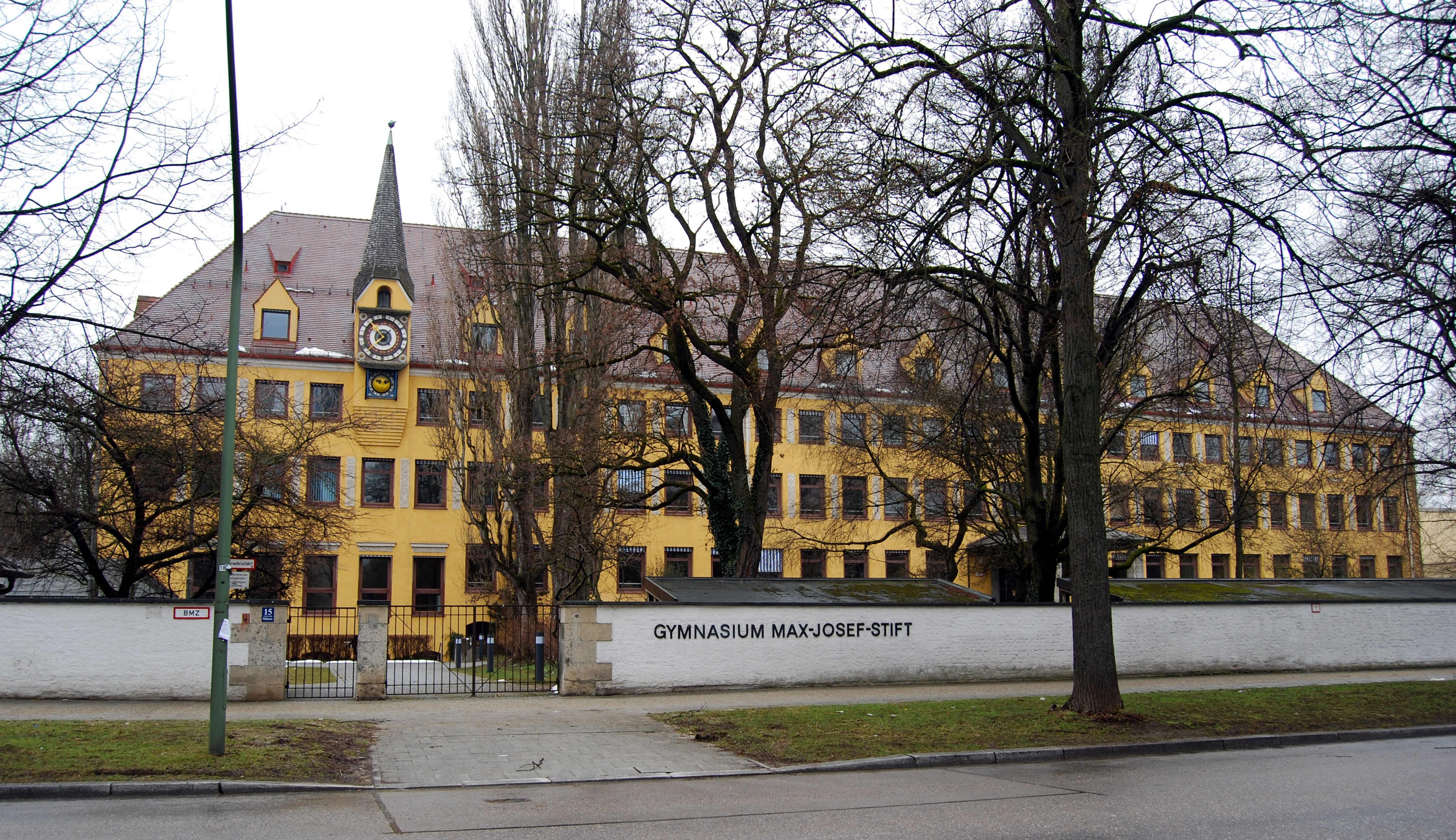 Gebäude des Max-Josef-Stift in München-Bogenhausen, Ansicht Mühlbaurstraße